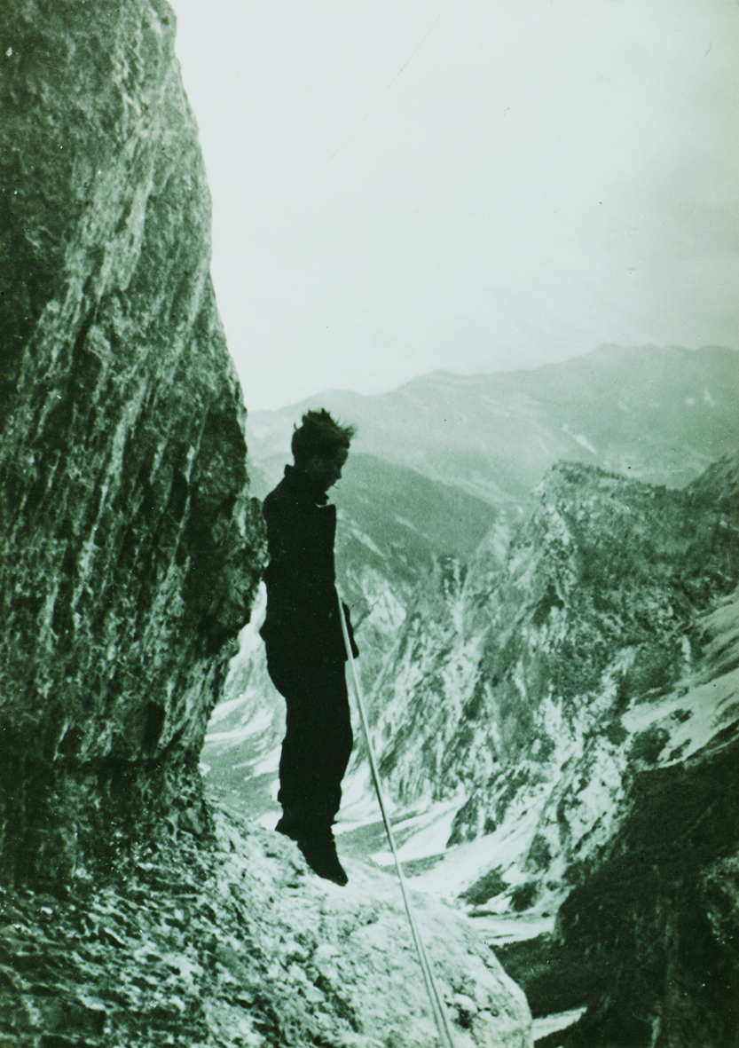 Mira Marko Debelak v Jalovčevi steni.